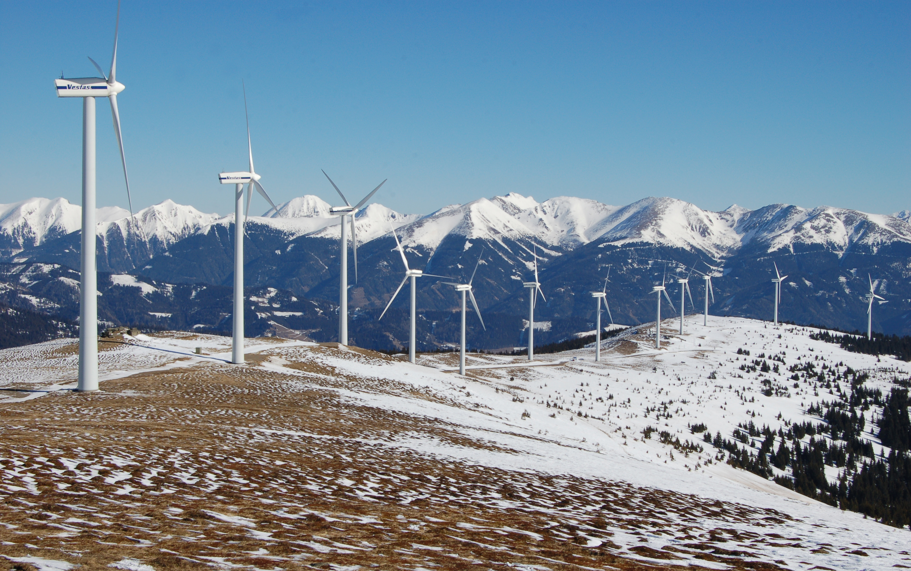 Windkraftanlage der in Oberzeiring am Ostrücken des Schönbergs (1943m) gegen Rottenmanner Tauern in der Steiermark